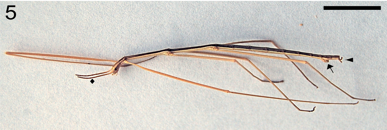 Leptynia annaepaulae male, holotype.